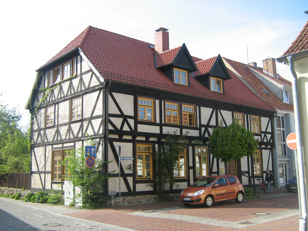 Fachwerkhaus am Klarissenkloster in Ribnitz (Ribnitz-Damgarten, Landkreis Nordvorpommern, Mecklenburg-Vorpommern).